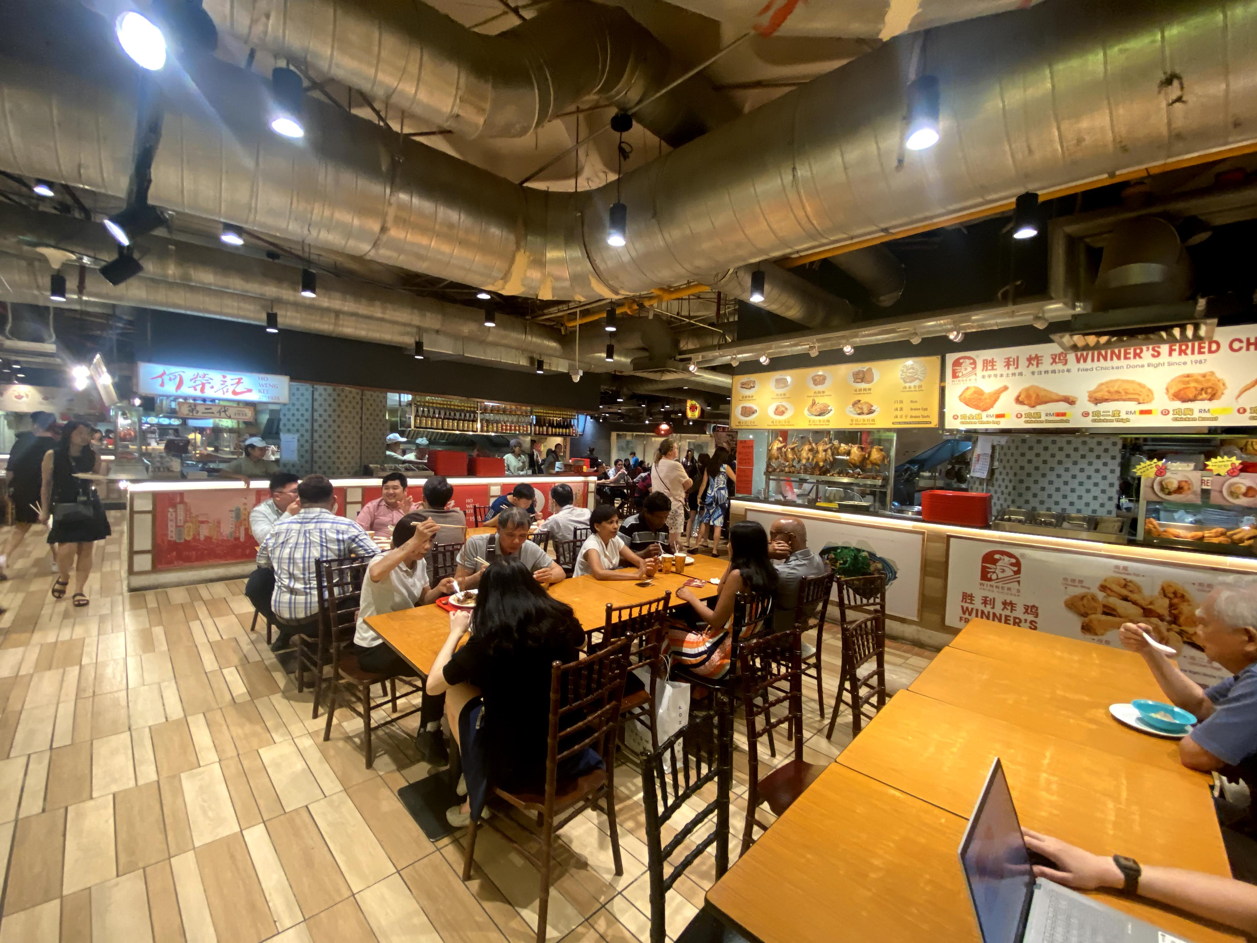 樂天廣場十號胡同